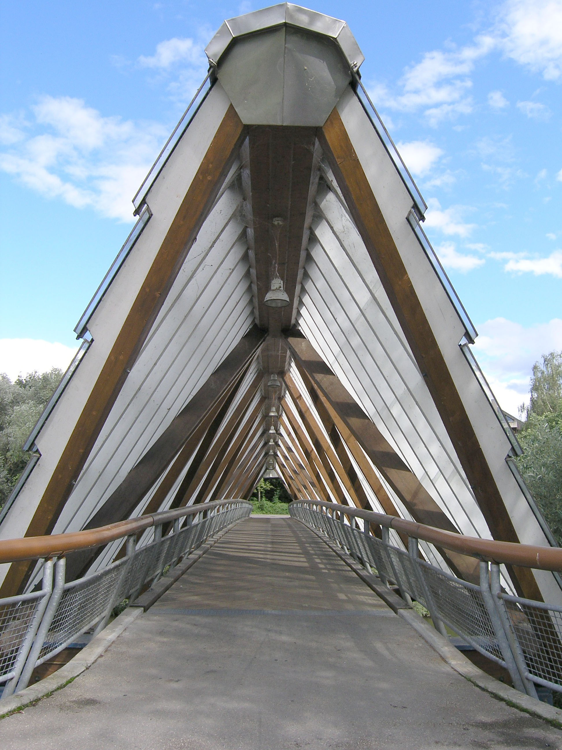 Die Remsecker freitragende Fuß- und Radwegbrücke aus Holz über die Rems kurz vor der Mündung in den Neckar.